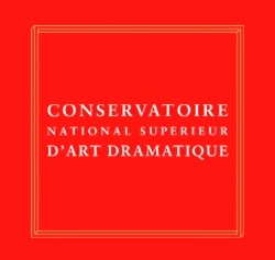 CNSAD